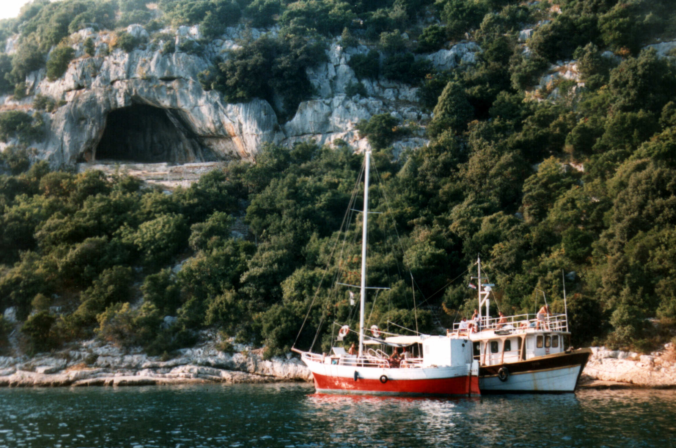 A Limski fjordban